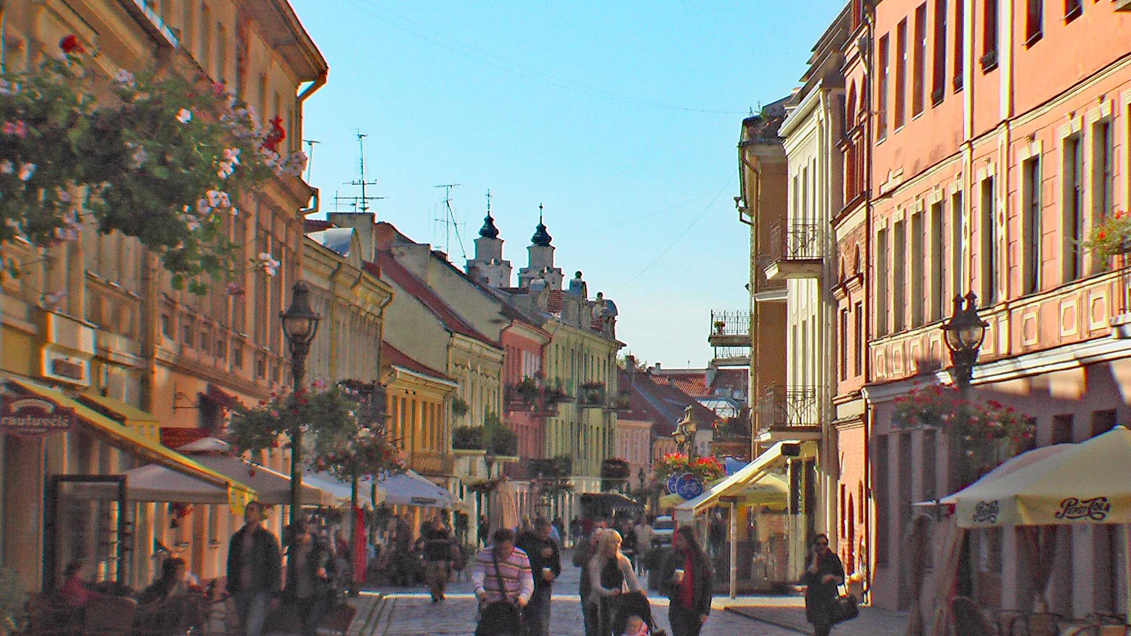 Vilniaus gatve in Kaunas.